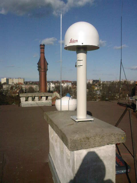 Stacja satelitarna GNSS GDPG na gmachu HYDRO Politechniki Gdańskiej.